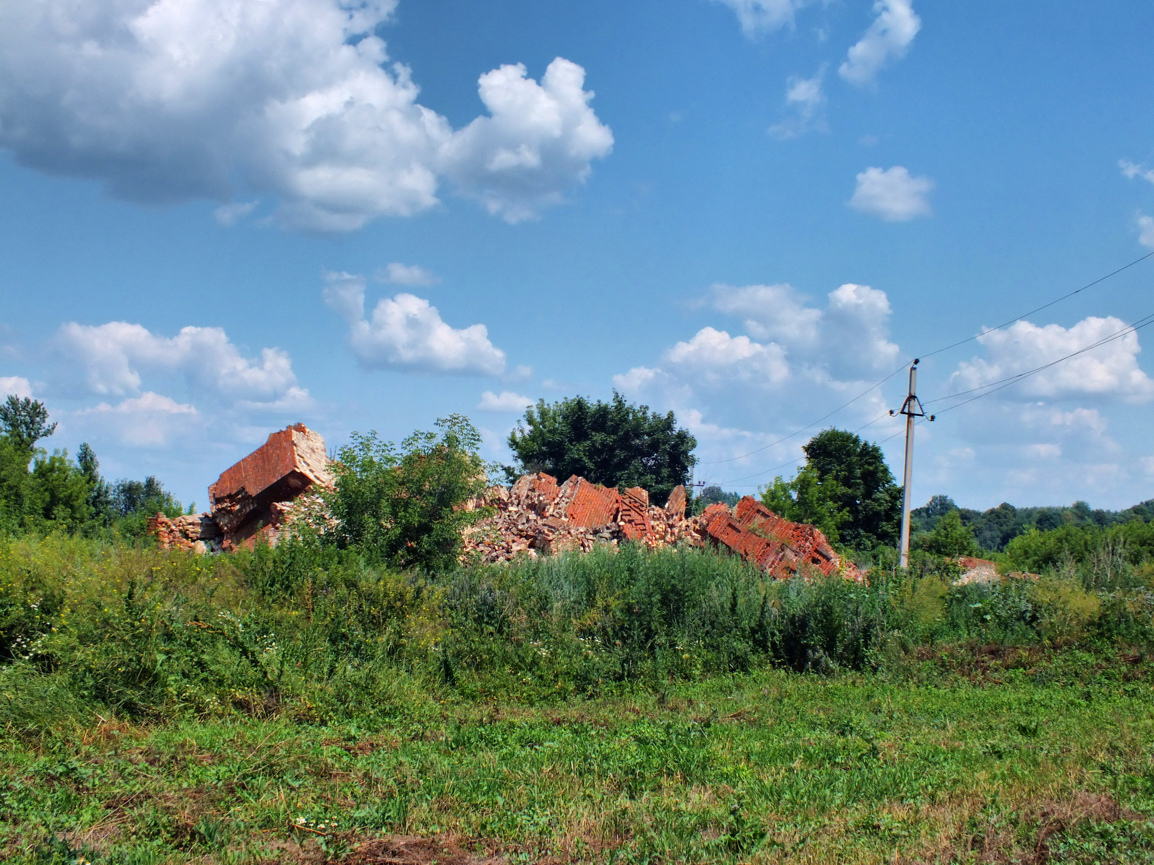 Ансамбль Софийского женского монастыря: Барятино, Данковский район, Липецкая область